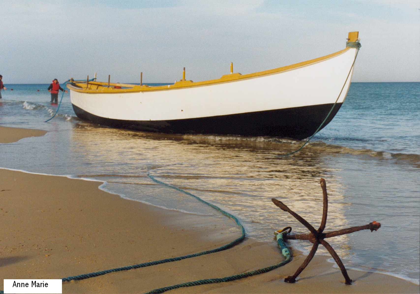 Pinasse à l'ancre ; Cap de l'Homy, Lit-et-Mixe, France